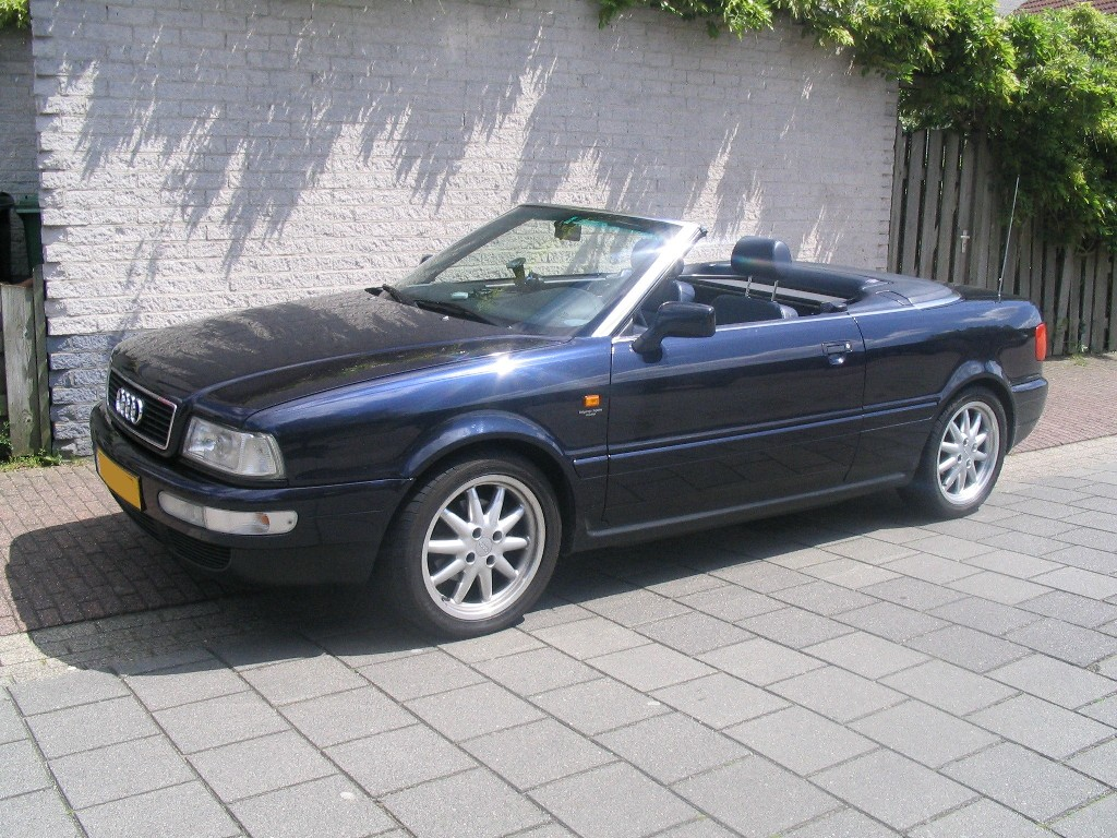 Audi Cabrio V6, 1999